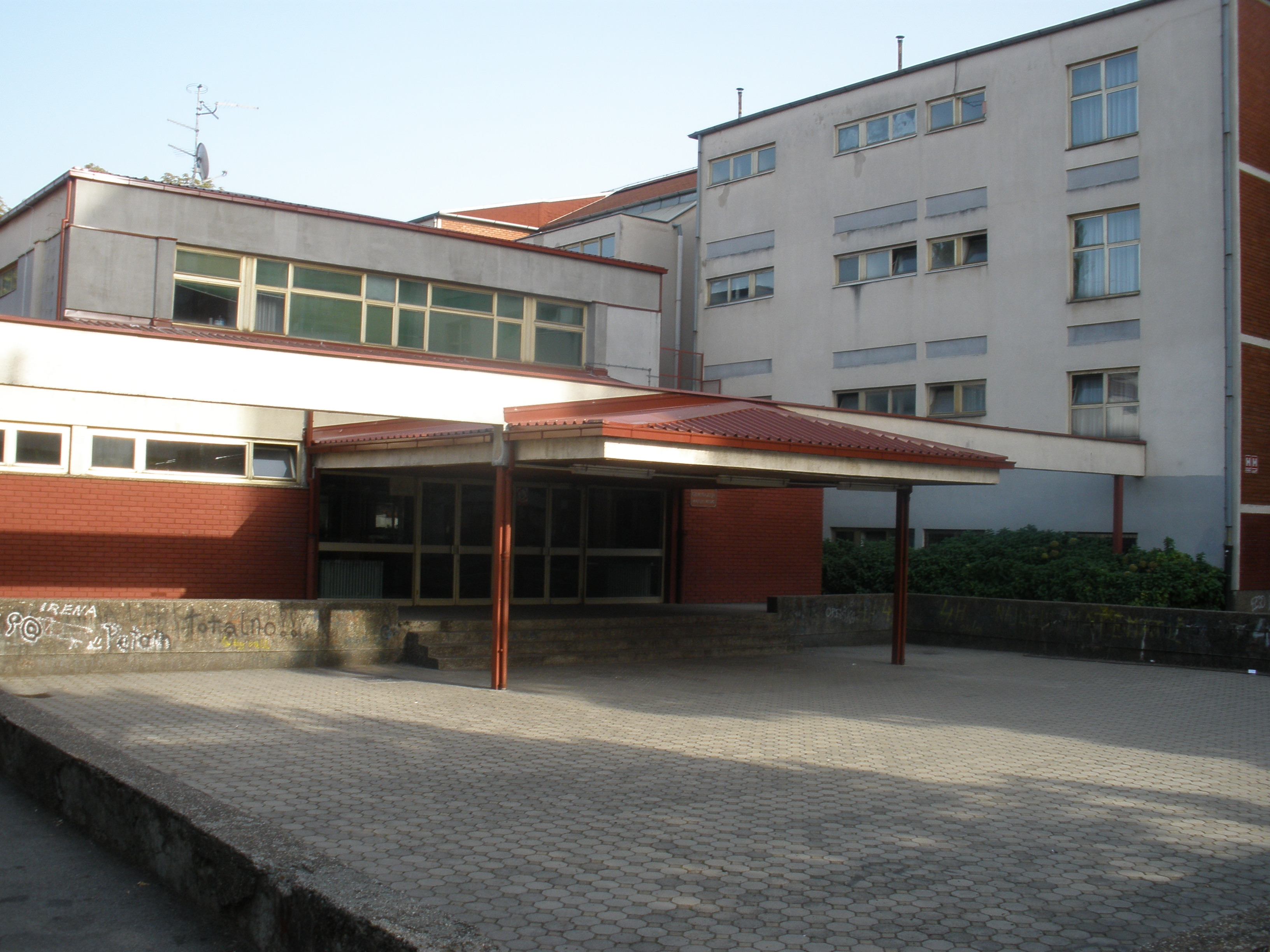 Gimnazija "MAtija Mesić" u Slavonskome Brodu.